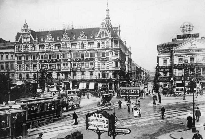 Berlin; Alexander Platz in Berlin, rechts das Haus mit den 99 Schafsköpfen 1910